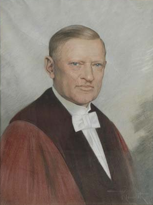 Portrait v. Ludwig Ebermayer 1858-1933, Staatsrichter, Reichsgerichtsrat, Senatspräs. zum Reichsgericht, 1921 Oberreichsanw. in Leipzig, u. höchster Ankläger d. Weimarer Rep. a.d. Prozessen geg. die Kapp-Putschisten